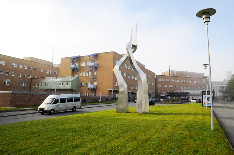 Universitetssykehuset Nord-Norge HF, Breivika, Tromsø